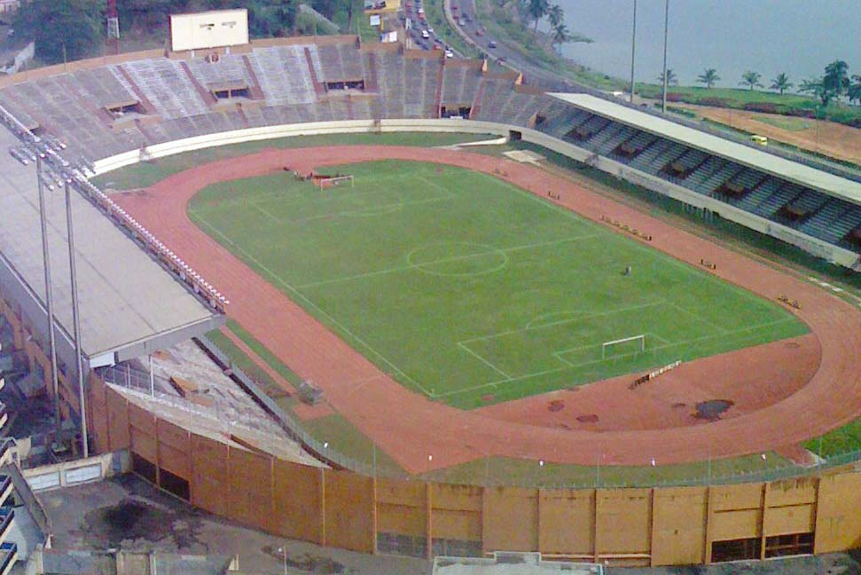 Vue aérienne du Stade Félix Houphouët-Boigny à Abidjan This file has been extracted from another file: AbidjanStade.JPG